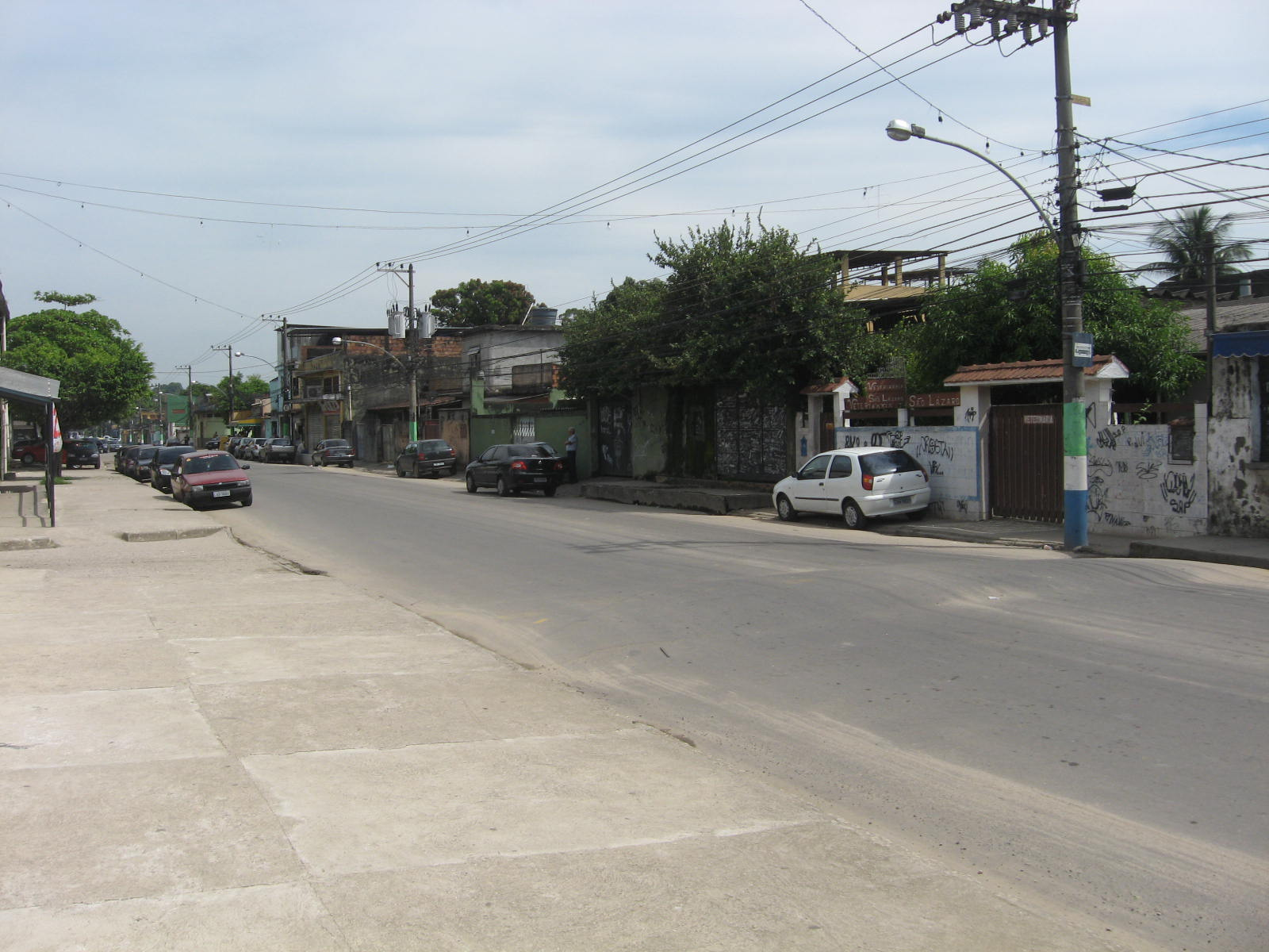 Vista do bairro Jardim Meriti, em São João de Meriti, RJ, Brasil.